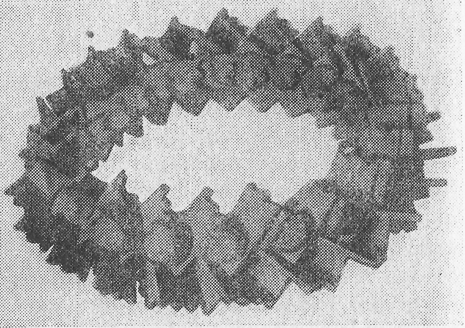 Schöttelkranz (Museum des Heimat- und Altertumsvereins im Kreise Jerichow I, Burg bei Magdeburg), 1935 oder früher, Das Bild wurde 1935 im Buch von Eduard Stegmann, Aus dem Volks- und Brauchtum Magdeburgs und der Börde, Magdeburger Kultur- und Wirtschaftsleben Nr. 4, Herausgegeben von der Stadt Magdeburg, Seite 48 veröffentlicht.